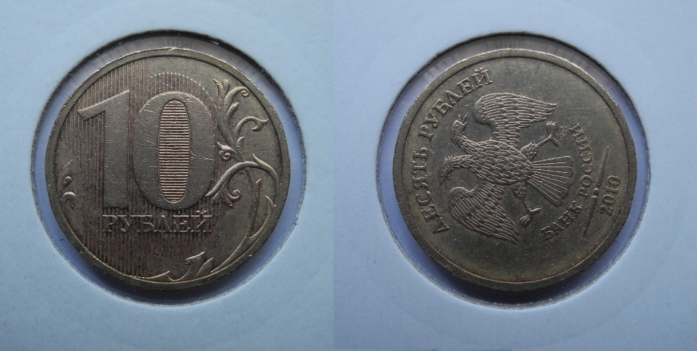 10 рублей банка России 2010 г. Поворот.